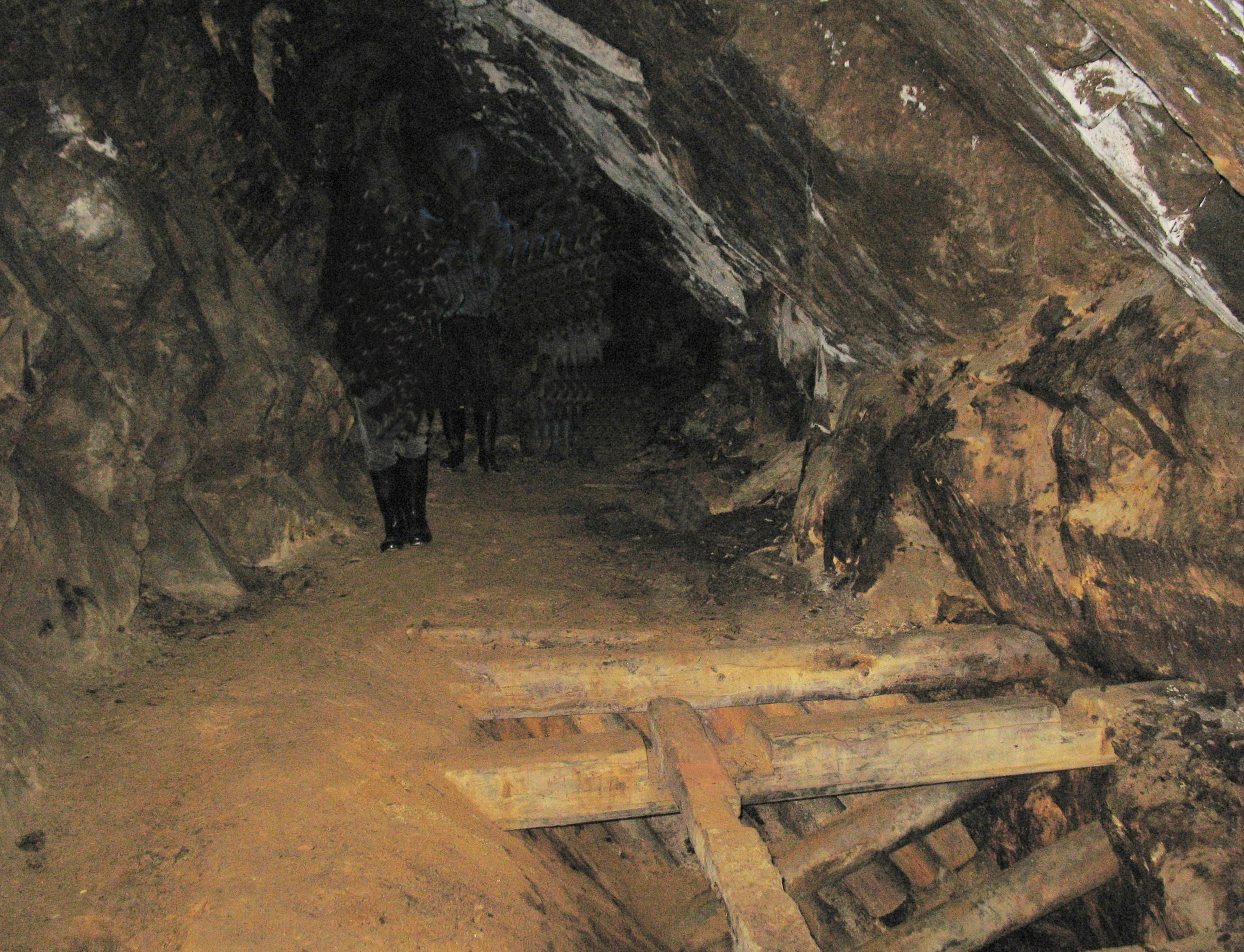 Pohled do nitra středověkého dolu